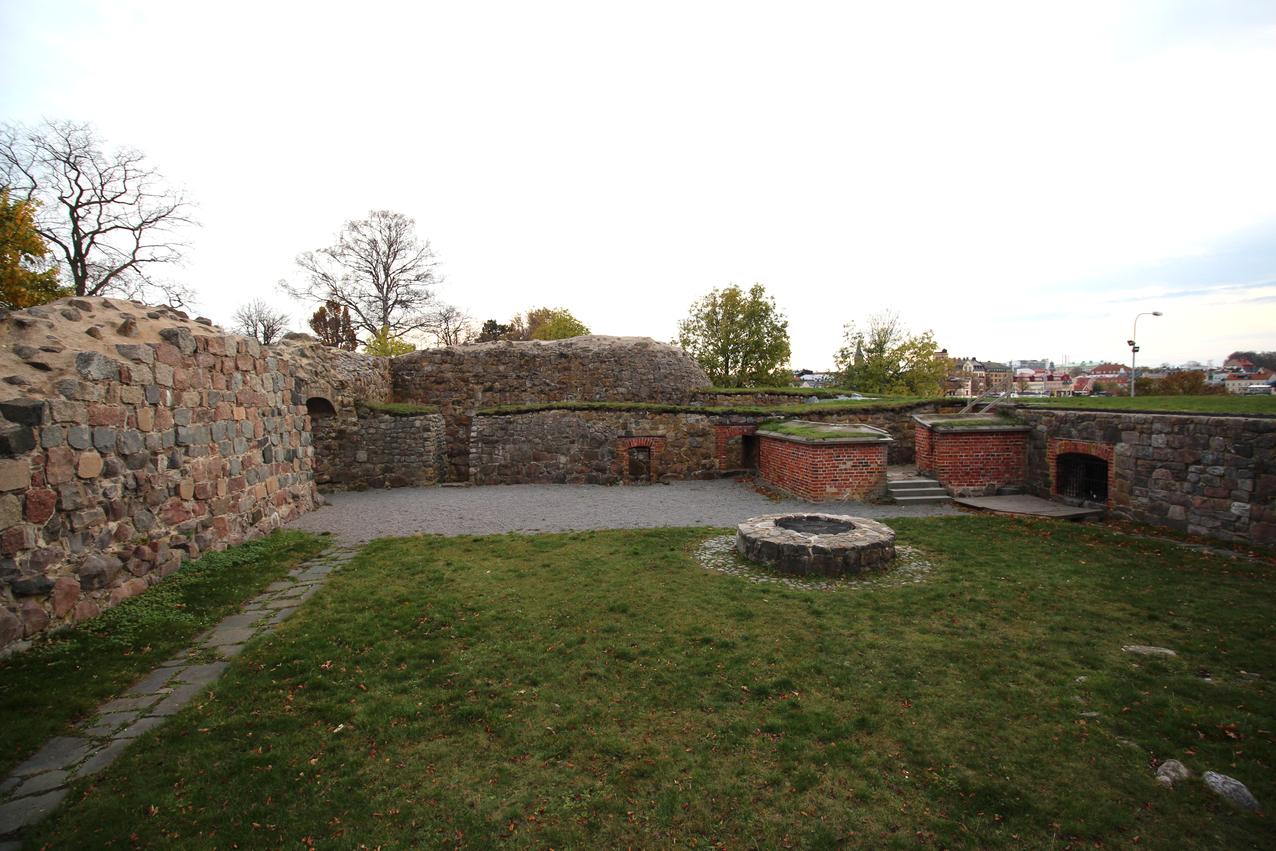 Stegeholm (Västervik 51:1)